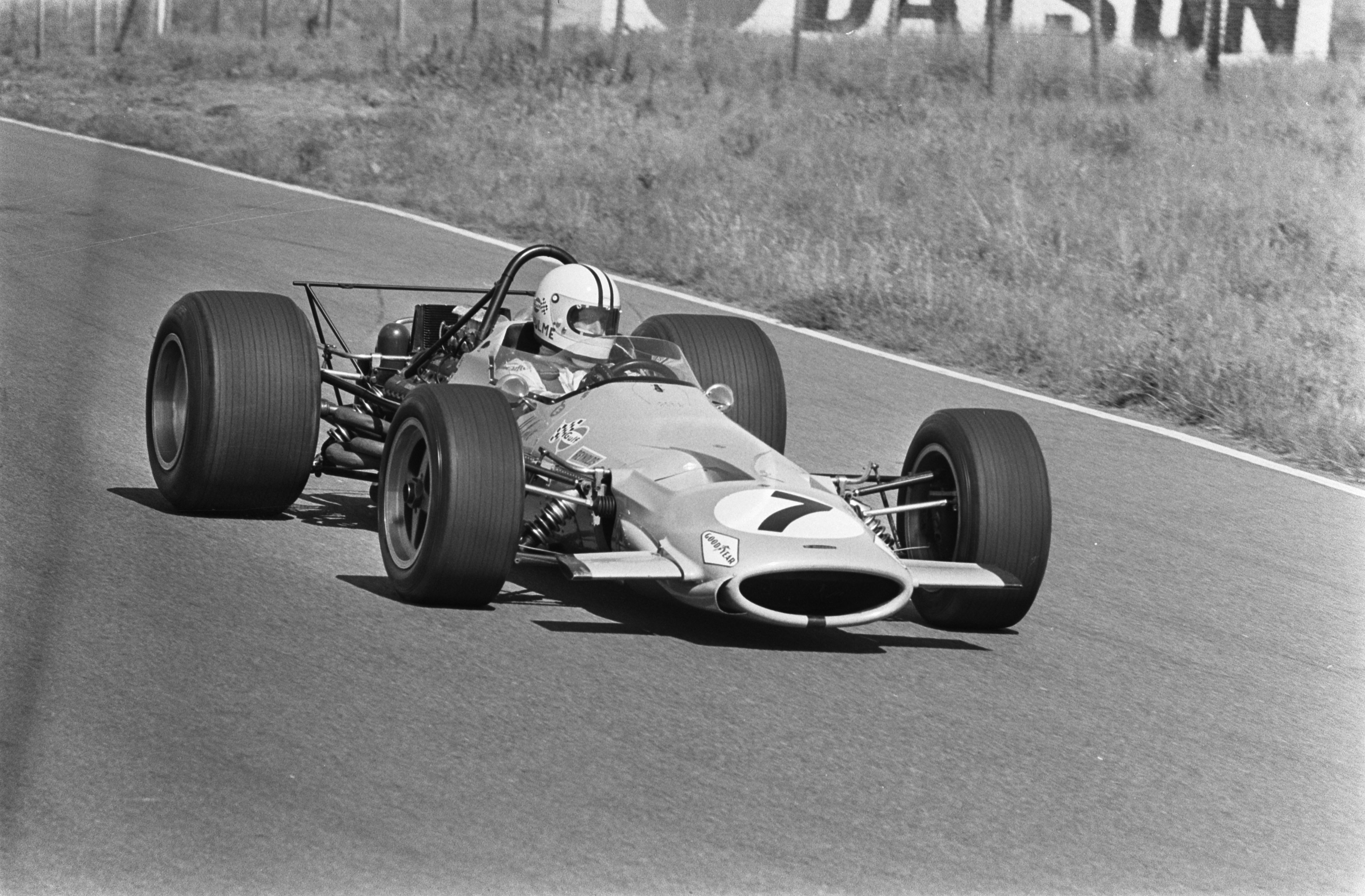 Collectie / Archief : Fotocollectie Anefo Reportage / Serie : Grand Prix Zandvoort 1969 Beschrijving : Denny Hulme in McLaren-Ford Datum : 19 juni 1969 Locatie : Noord-Holland, Zandvoort Trefwoorden : autosport Fotograaf : Joost Evers / Anefo Auteursrechthebbende : Nationaal Archief Materiaalsoort : Negatief (zwart/wit) Nummer archiefinventaris : bekijk toegang 2.24.01.05 Bestanddeelnummer : 922-5455